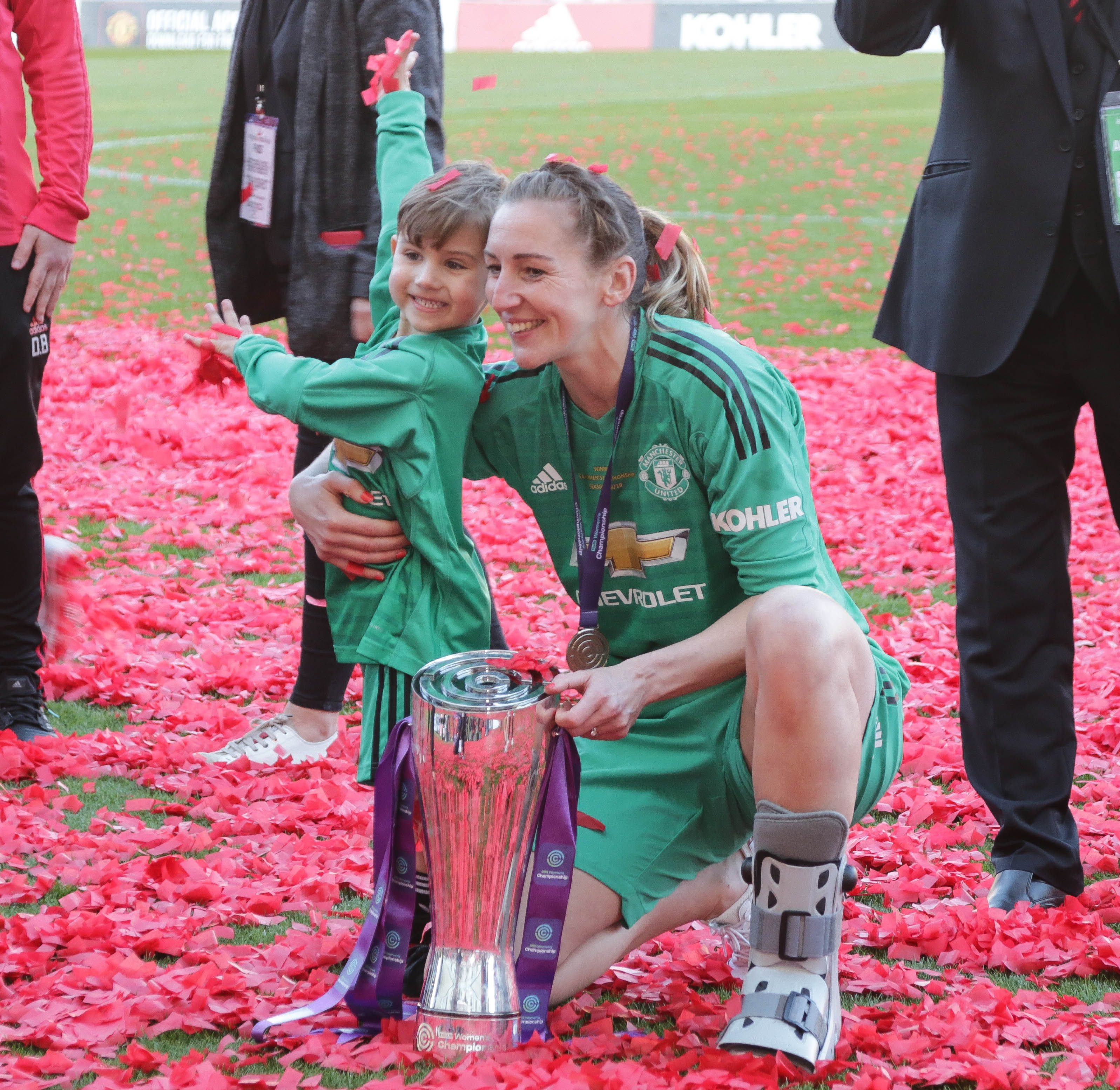 Man Utd Women 5 Lewes FC Women 0 11 05 2019-787.jpg